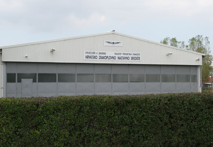 Hrvatsko zrakoplovno nastavno središte Lučko, Zagreb